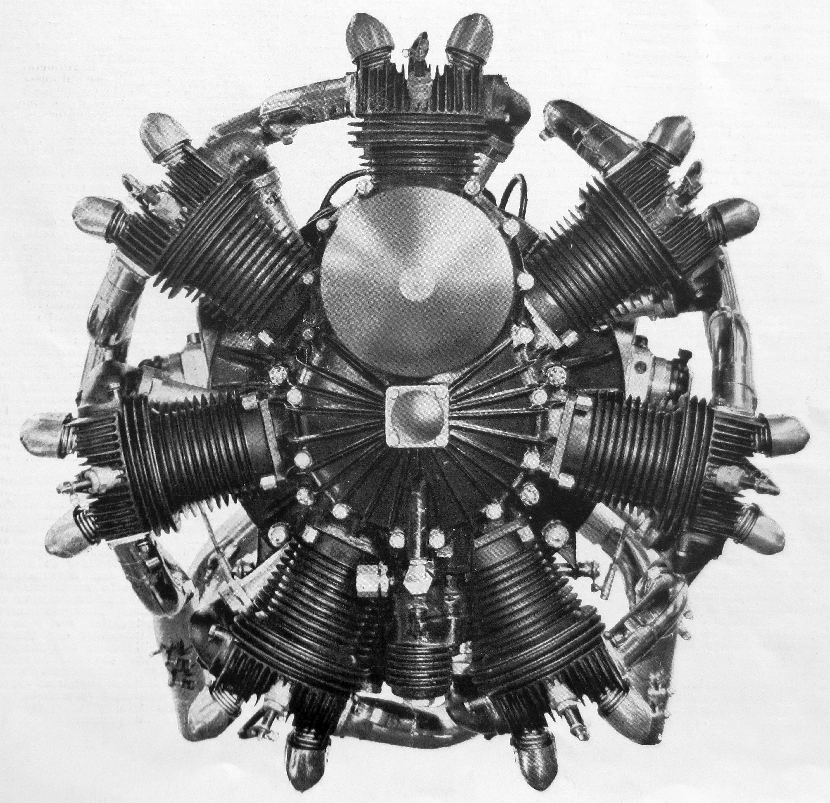 Walter Mira-R (1934)